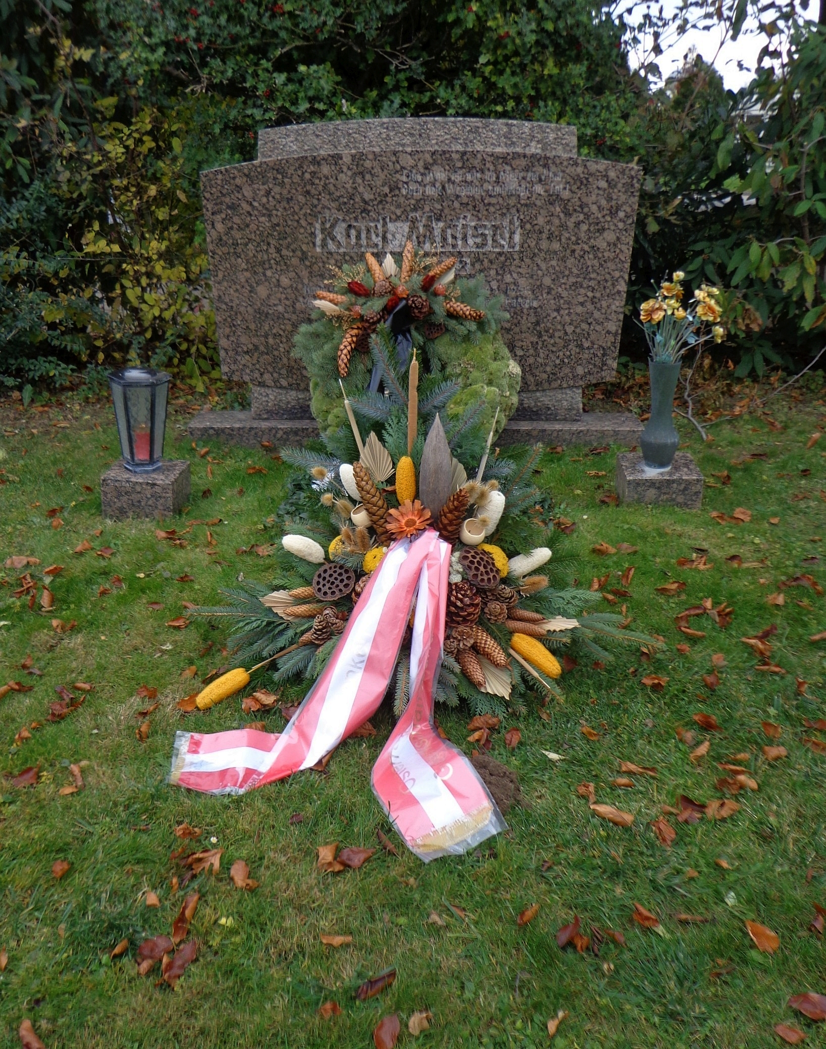 Wiener Zentralfriedhof - Gruppe 14 C, Ehrengrab von Karl Maisel